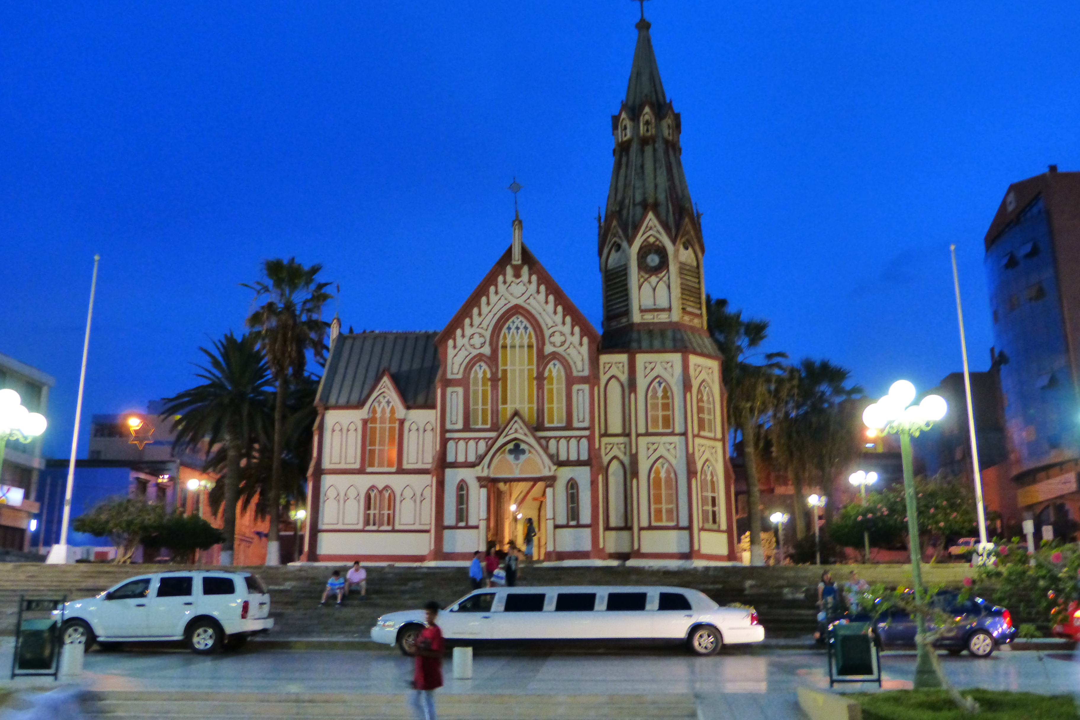 Fotografía tomada a fines de febrero del año 2013 en la ciudad de Arica, nocturna como se ve, con una limusina de un casamiento en su exterior y una buena iluminacion en su interior.